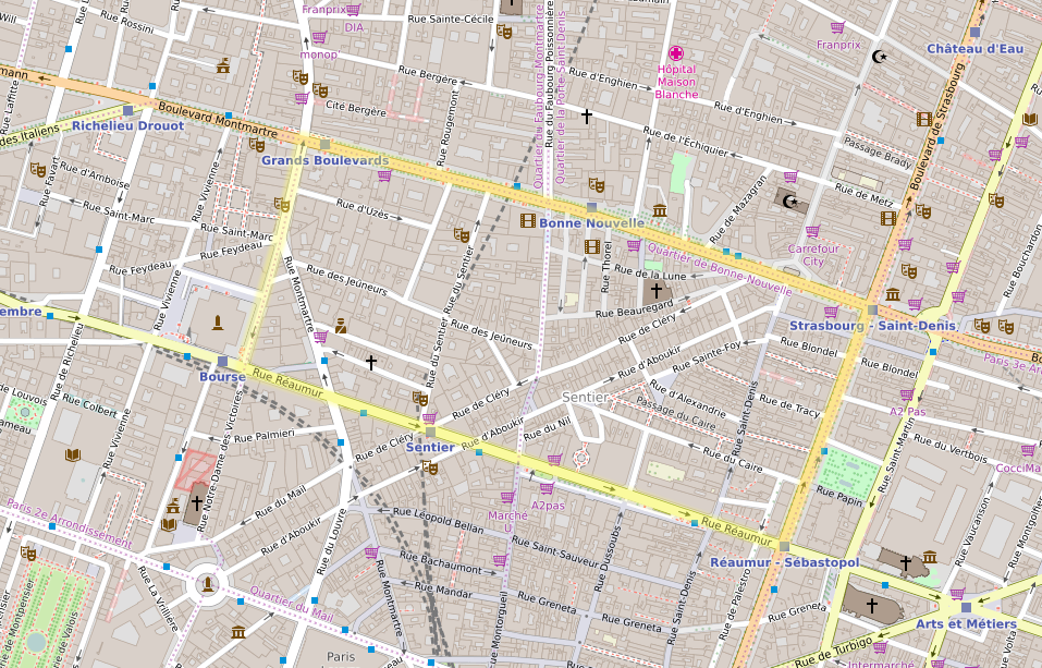 Impression d'écran d'OpenStreetMap ( avec les limites du quartiers du Sentier ajoutées en jaune transparent.